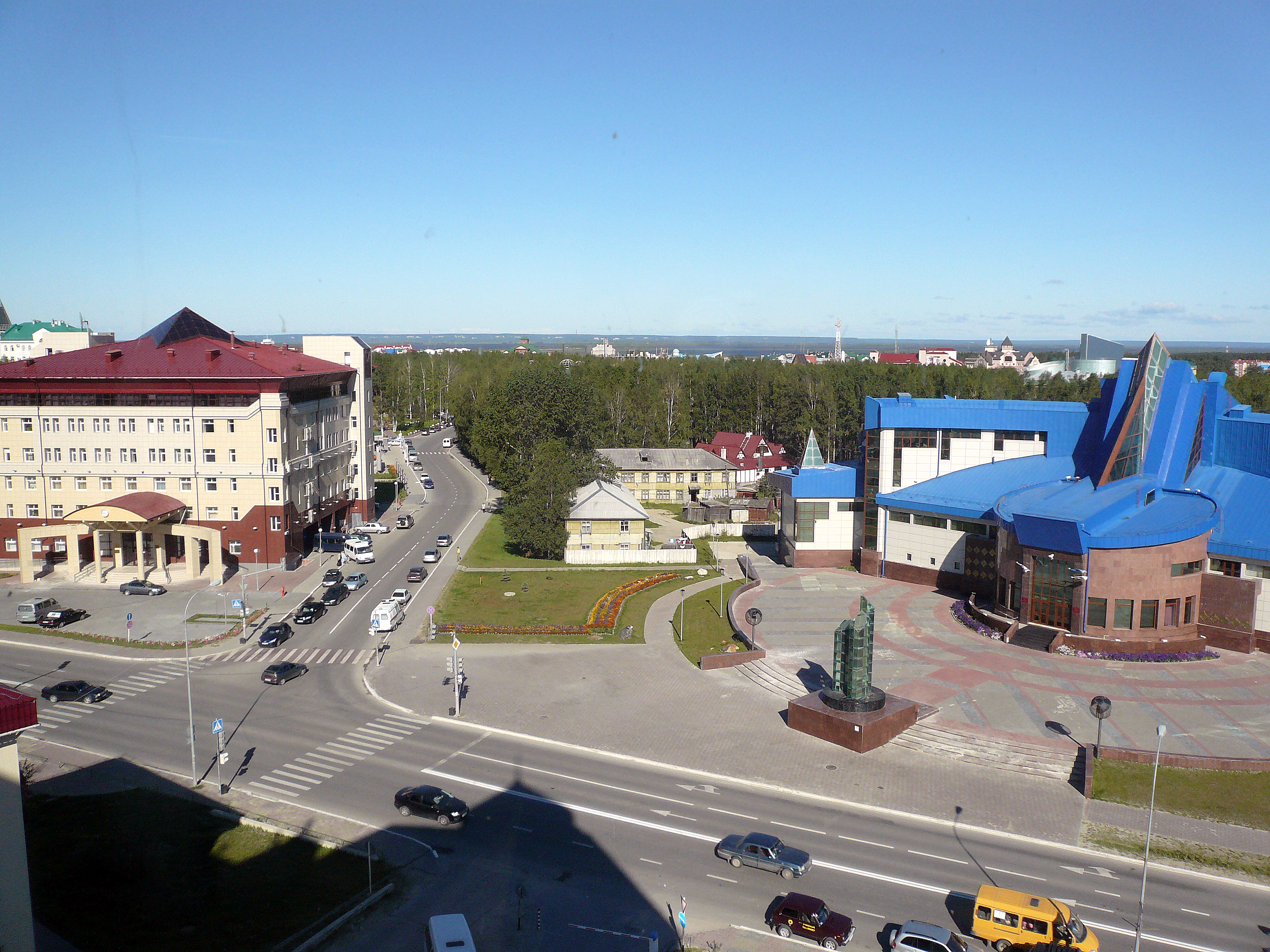 Улица Чехова